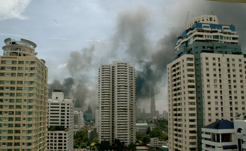 Tres incendios en Bangkok tras el asalto del ejército a los Camisas Rojas el 19 de mayo de 2010.